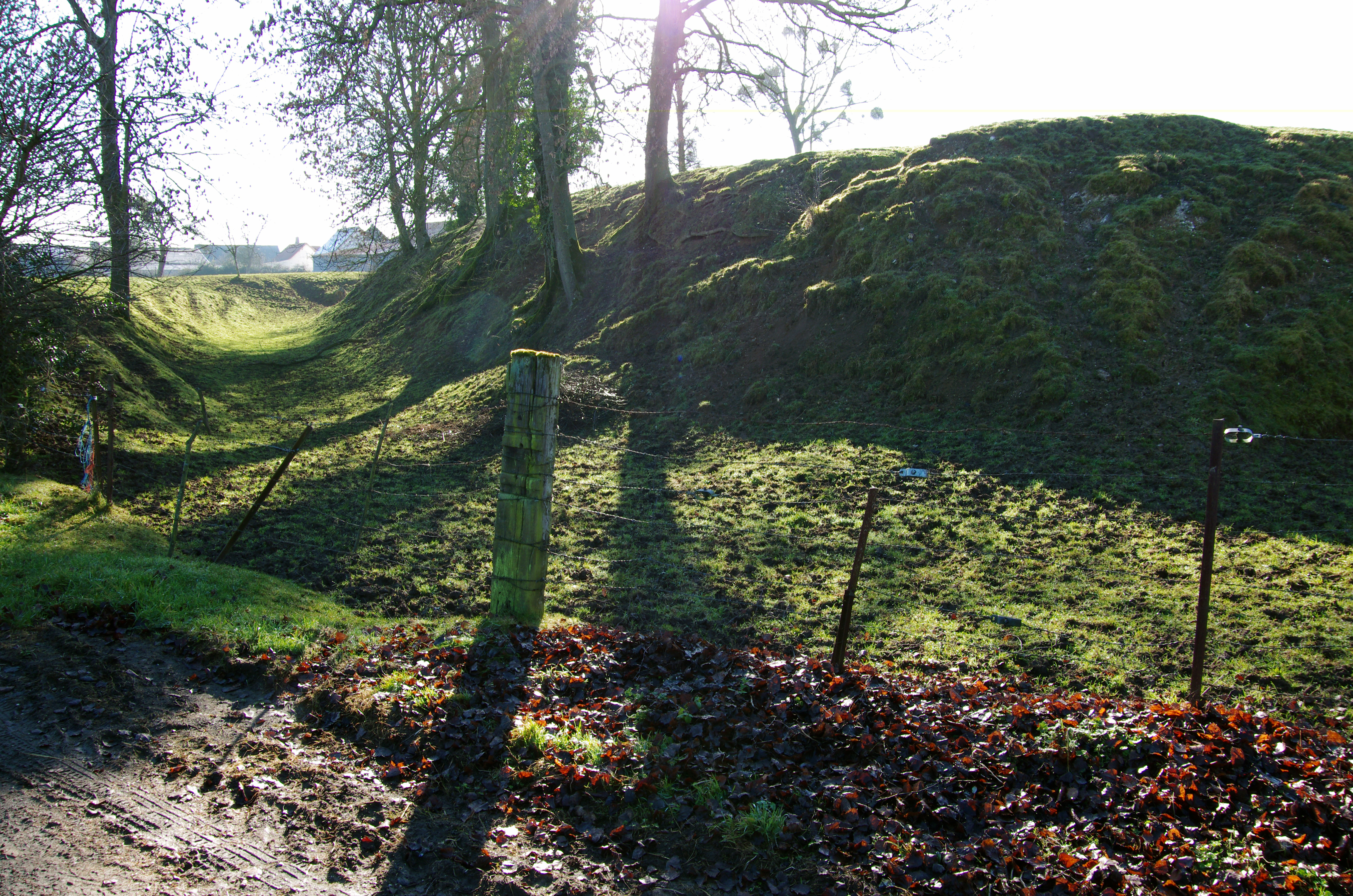 Le Translay (Somme, France) - La motte castrale. .